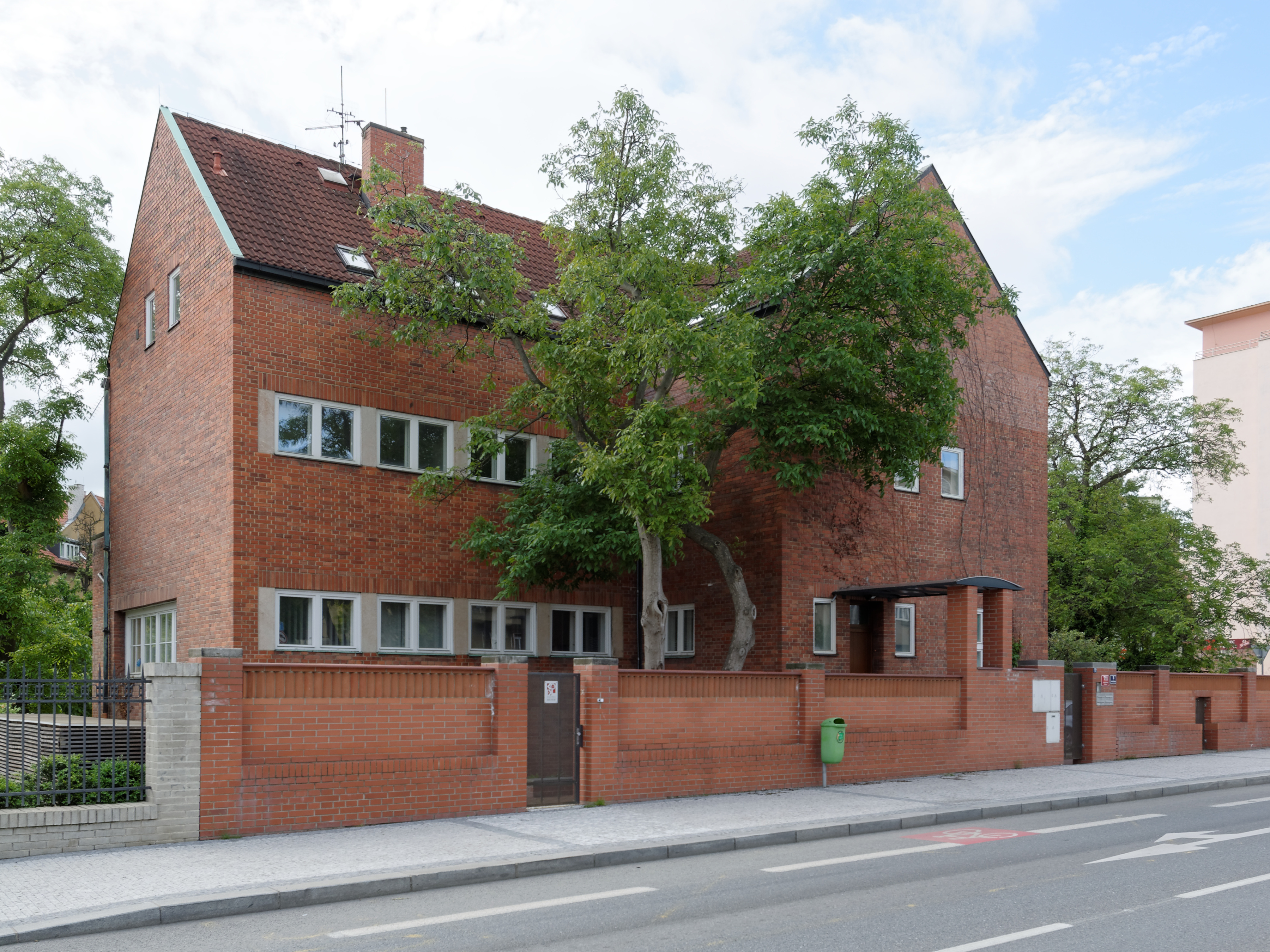 Jiří Kodl (1889 - 1955): vlastní vila architekta, Praha 6 - Střešovice, čp. 711, Patočkova 5.